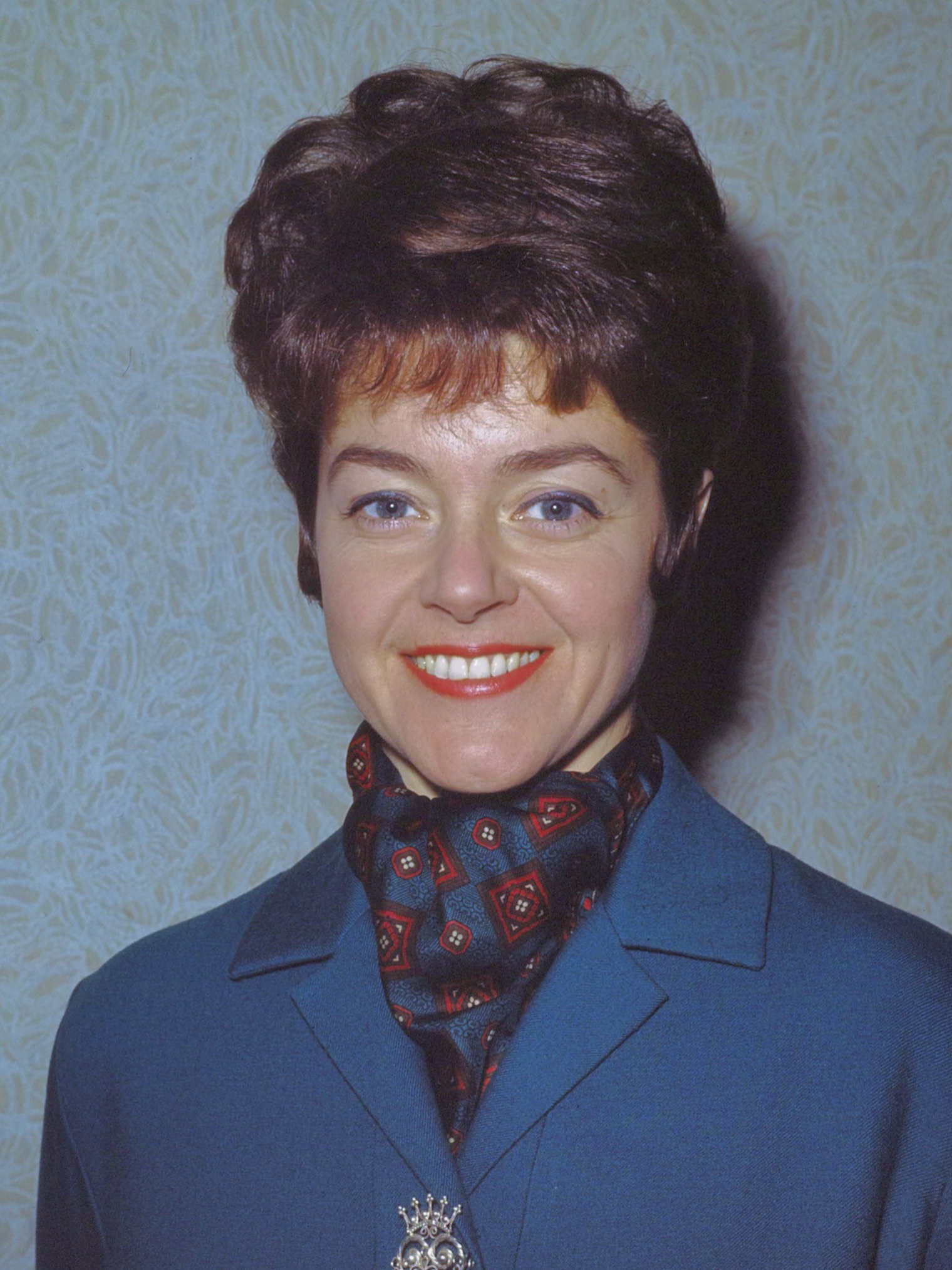 Teddy Scholten